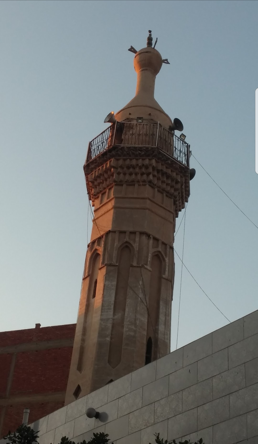 مئذنة مسجد الزنفلة تعتبر من الاثار الاسلامية بالمحافظة